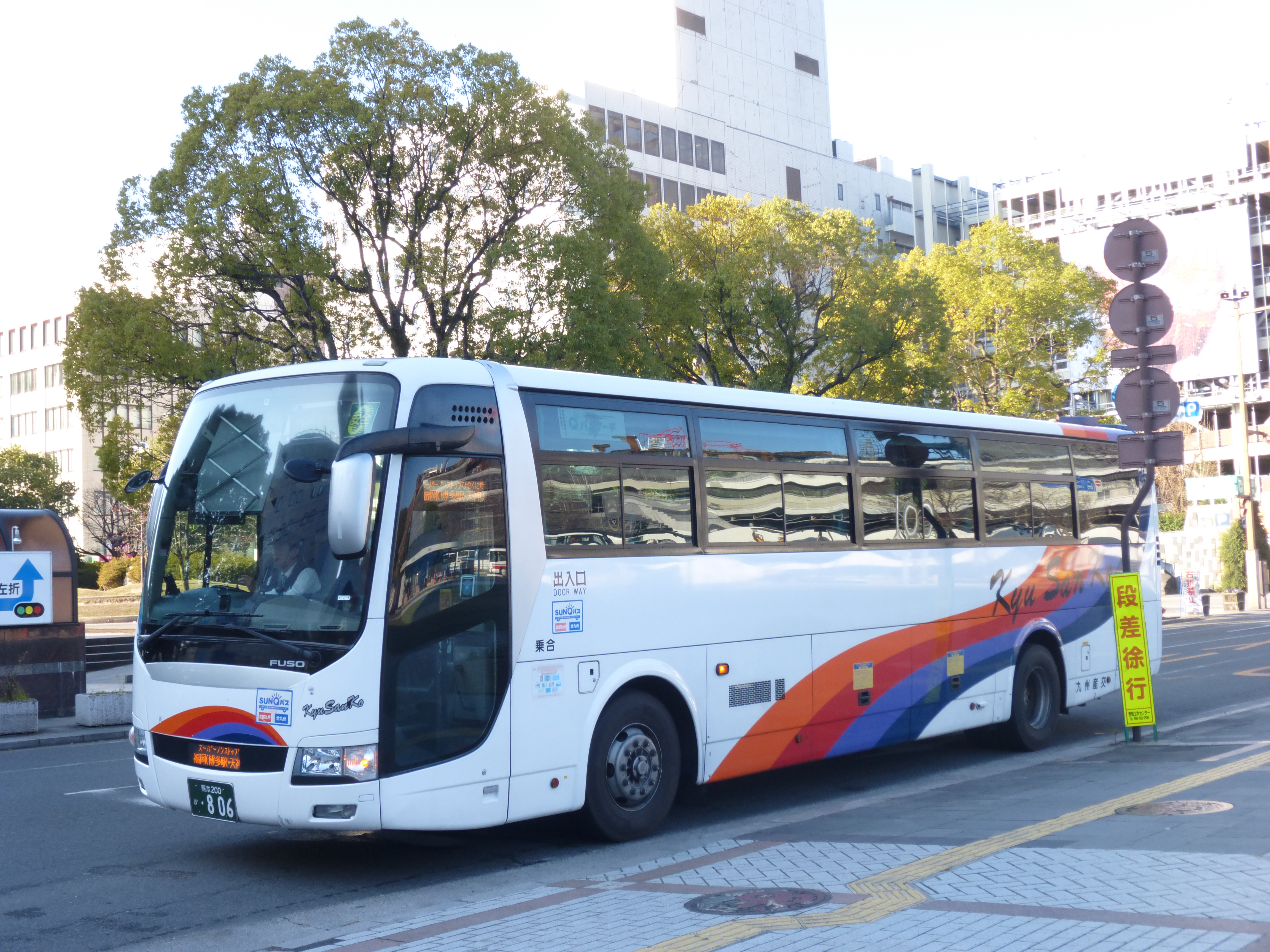 九州産交バス「ひのくに号」専用車、熊本200 か 806 車種：三菱ふそうエアロエース。熊本交通センターにて撮影